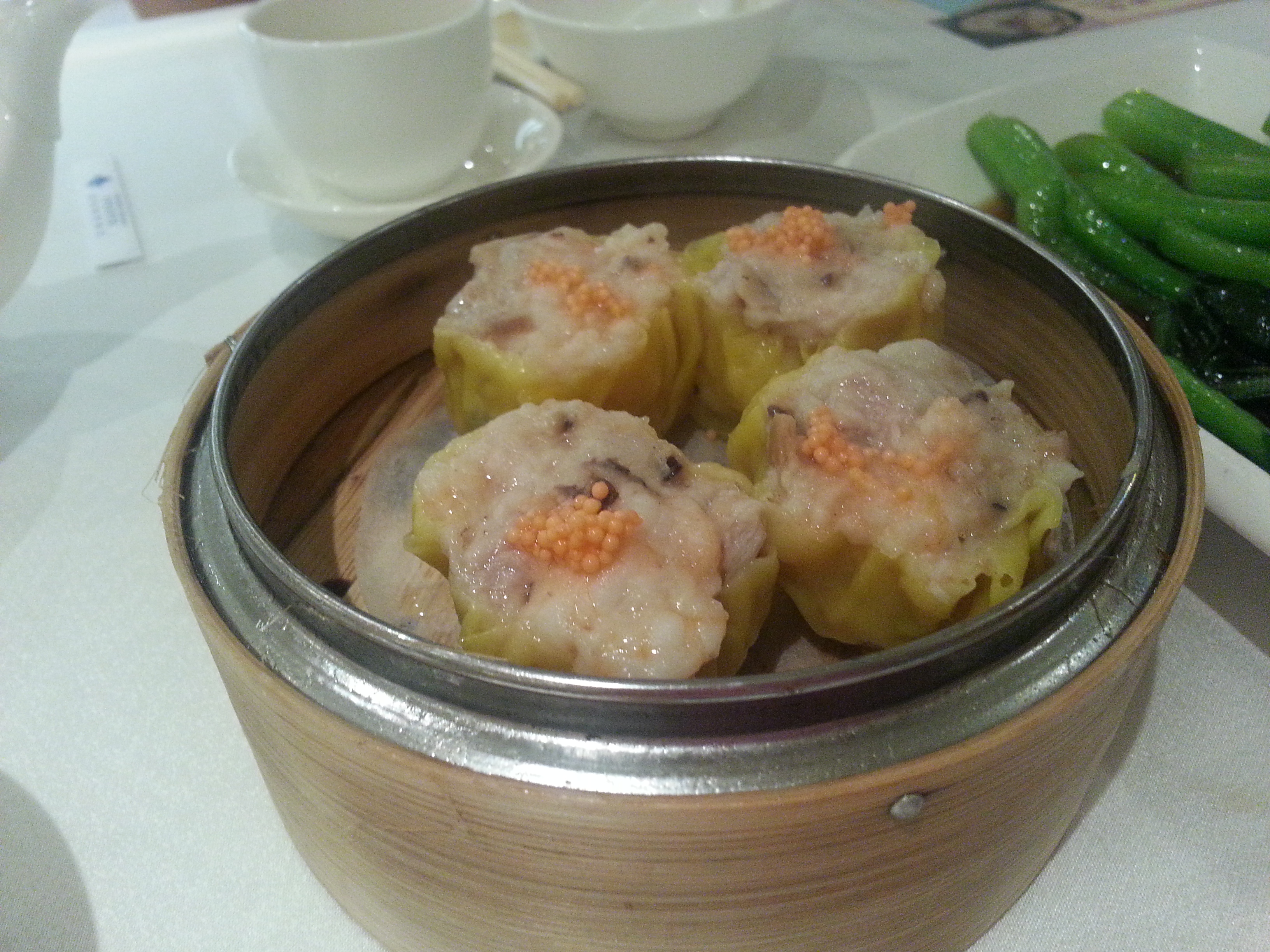 사오마이의 모습